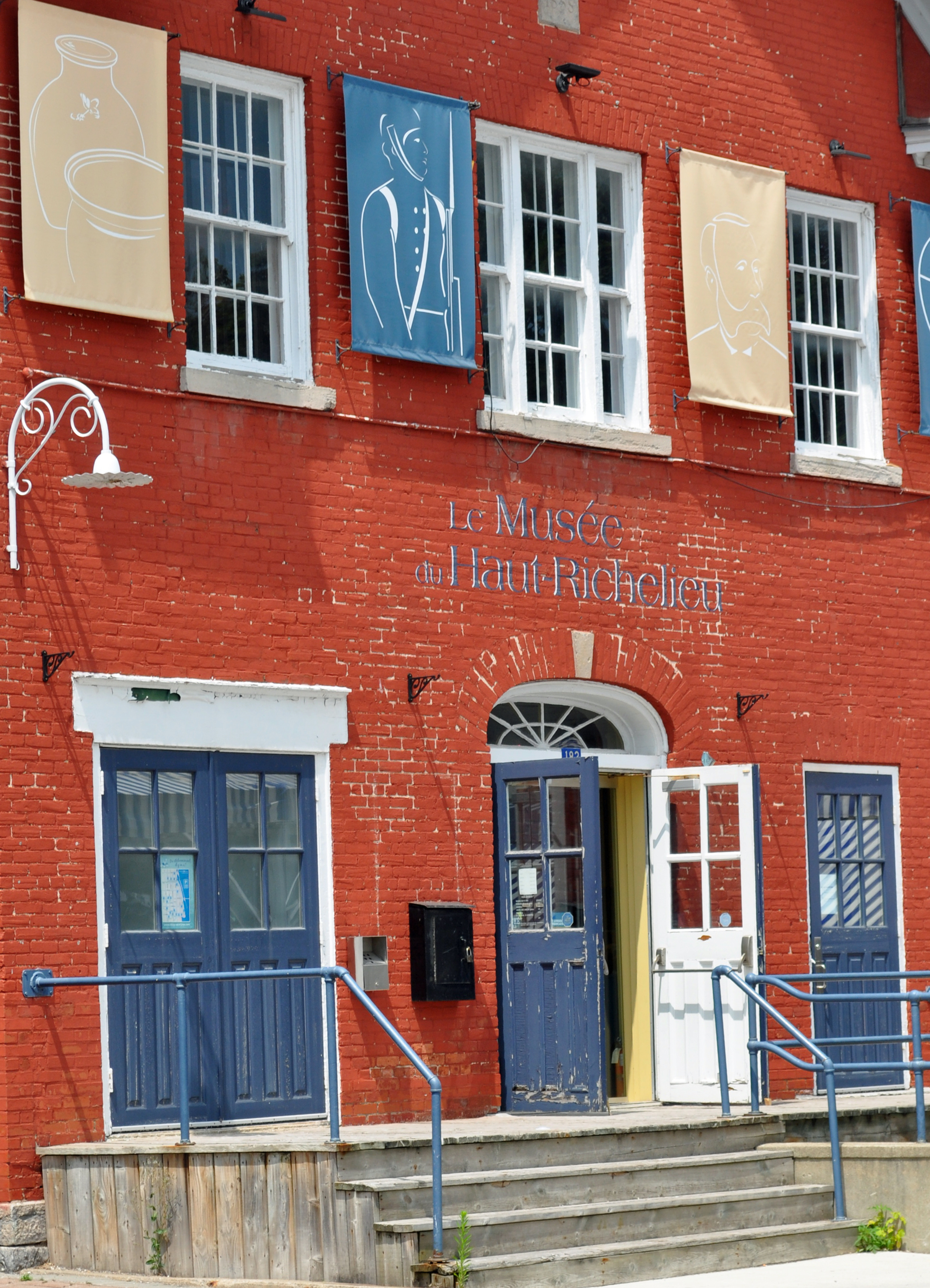 Saint-Jean-sur-Richelieu